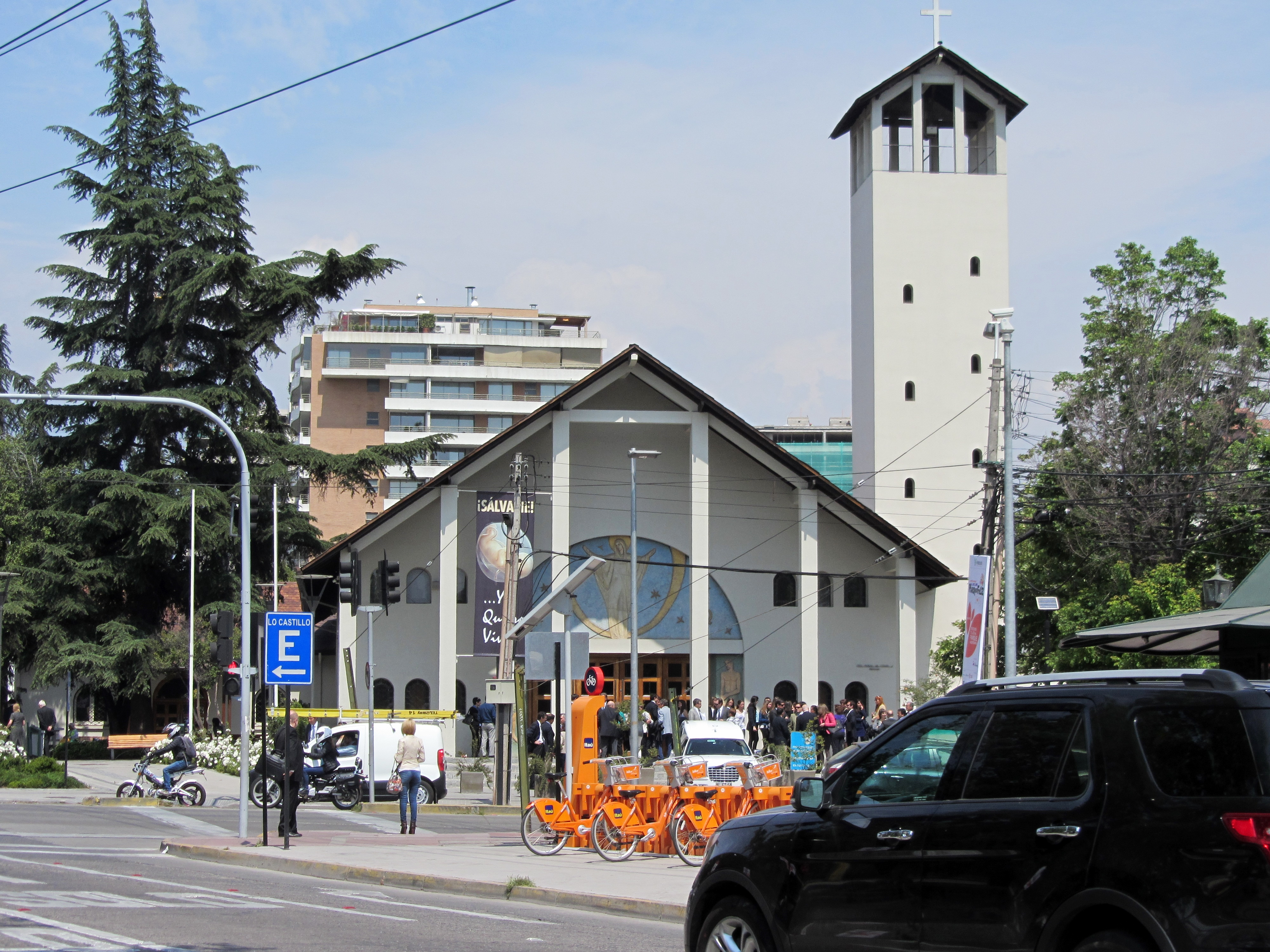 Iglesia de la Inmaculada Concepción en la avenida Vitacura, esquina Alonso de Córdova. Arquitecto, Joaquín Manuel de Ferari, terminada de erigir a fines de 1953.